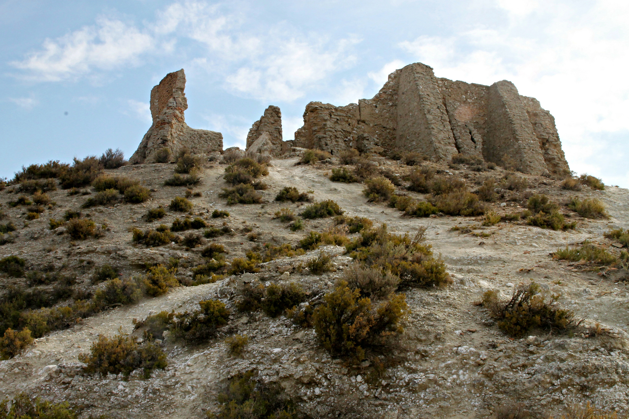 [Ruinas] Construído como castillo en torno al S. XIII, reconstruído a posteriori como ermita. [Plano general]